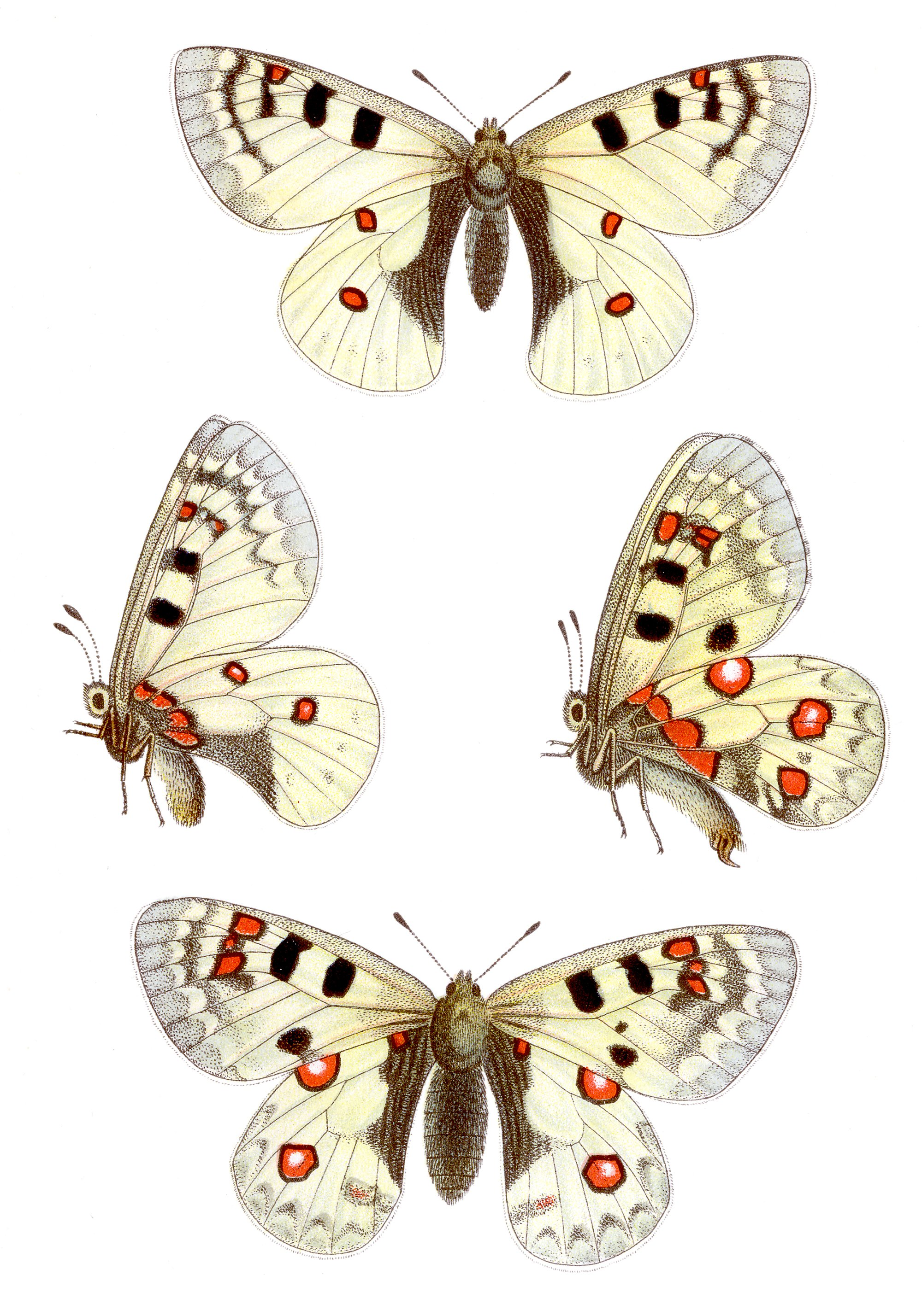 Alpenapollo - Parnassius phoebus